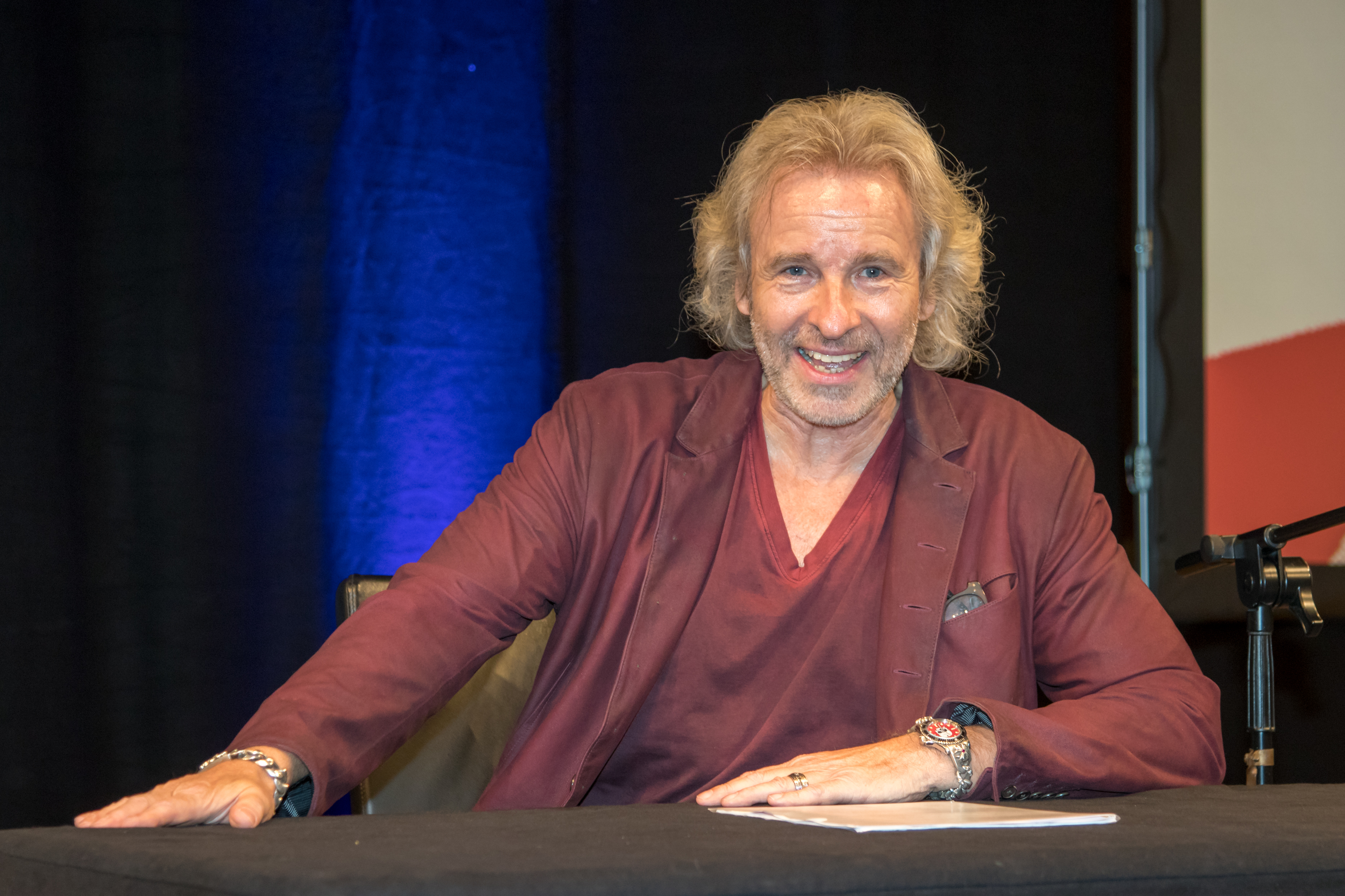 Cosmo - Wir wollen das Meer sehen: Solidaritätsveranstaltung für Deniz Yücel und alle anderen inhaftierten Journalisten gemeinsam mit der Initiative Free Deniz. Thomas Gottschalk